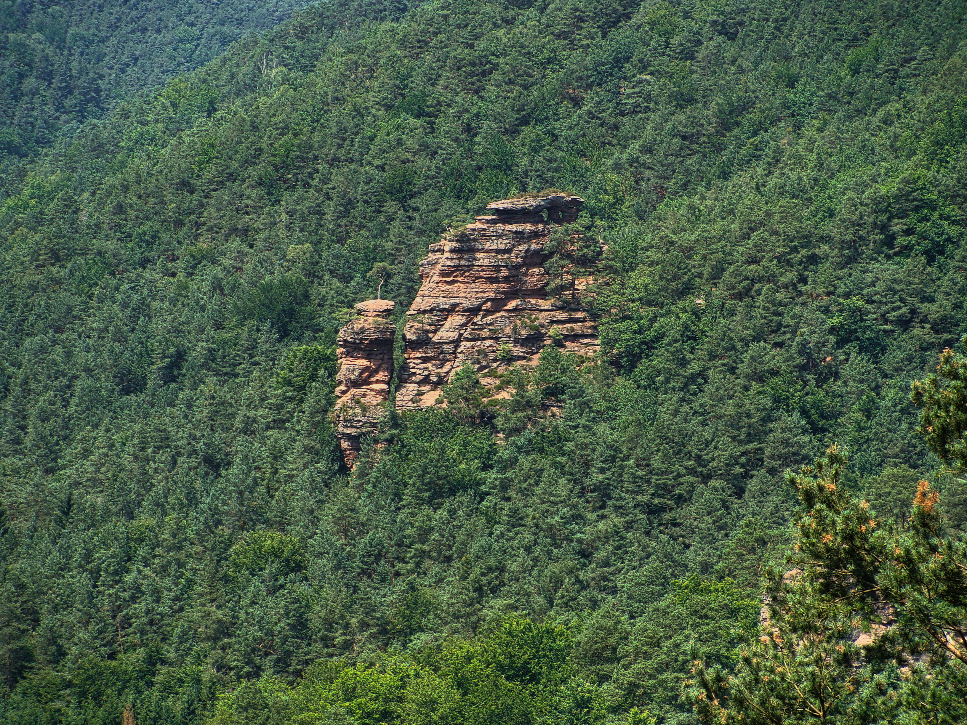 Stephansturm im Queichtal (Wasgau, Pfälzerwald)